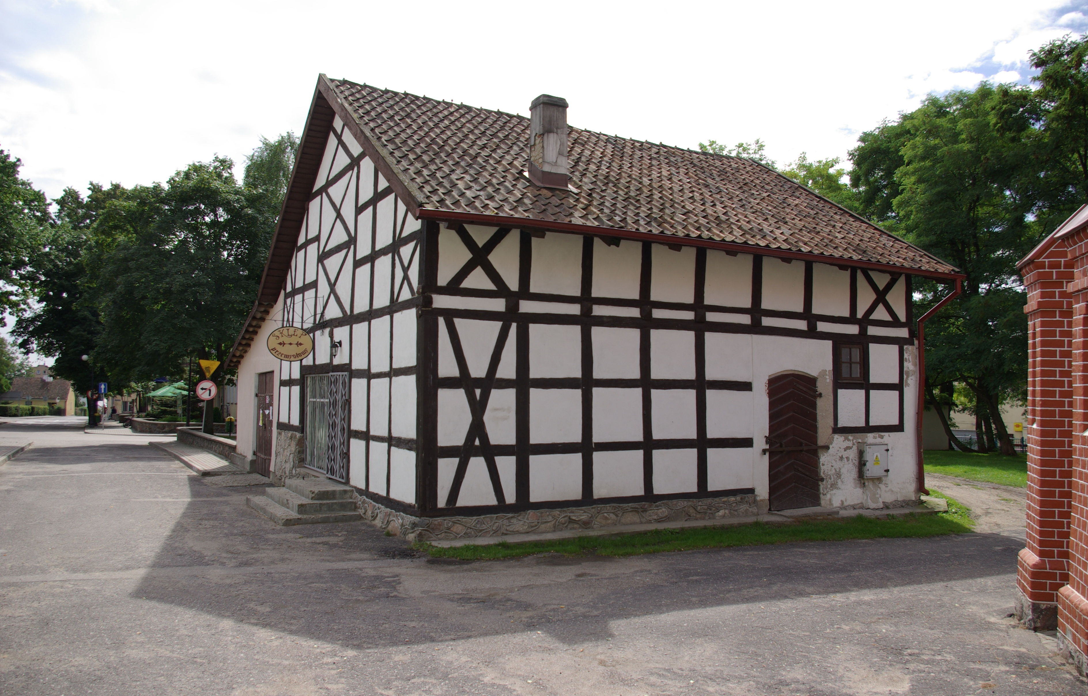 Srokowo